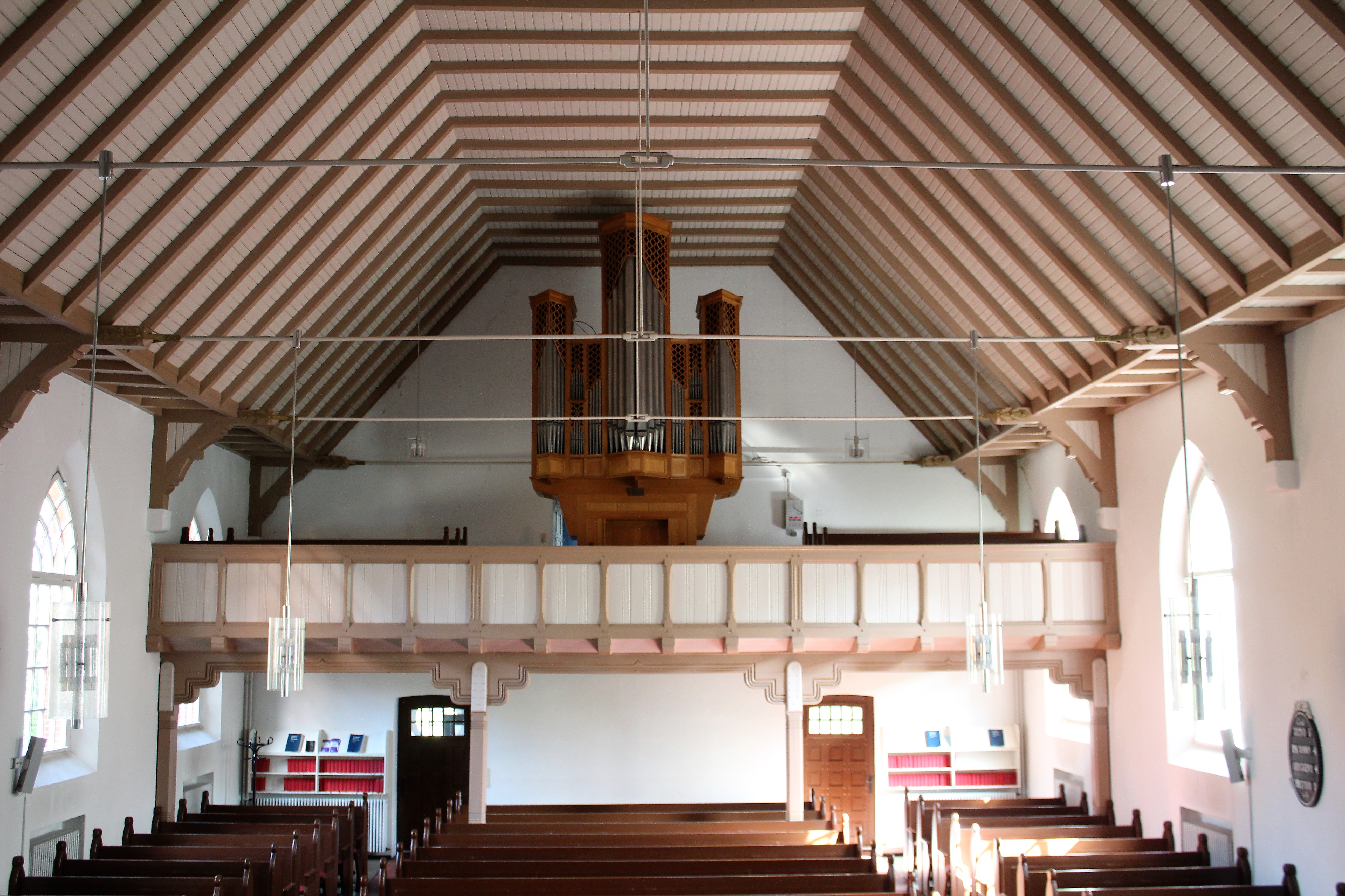 Ev.-reformierte Kirche Möhlenwarf, Landkreis Leer, Ostfriesland, Deutschland